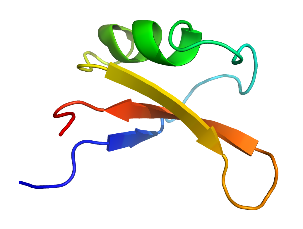 Brazzein